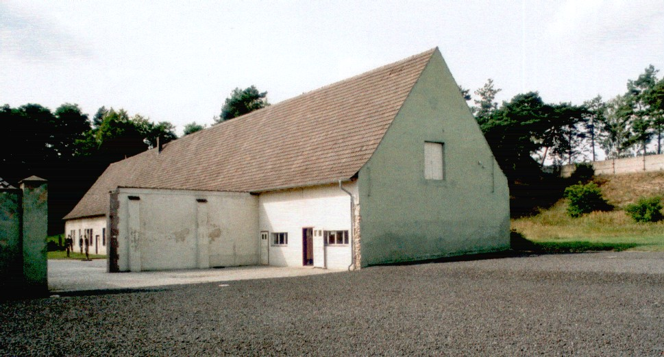 Mahn- und Gedenkstätte KZ Ravensbrück - Lagertor (Innenansicht) mit ehemaliger Telefonzentrale und Wasserwerk